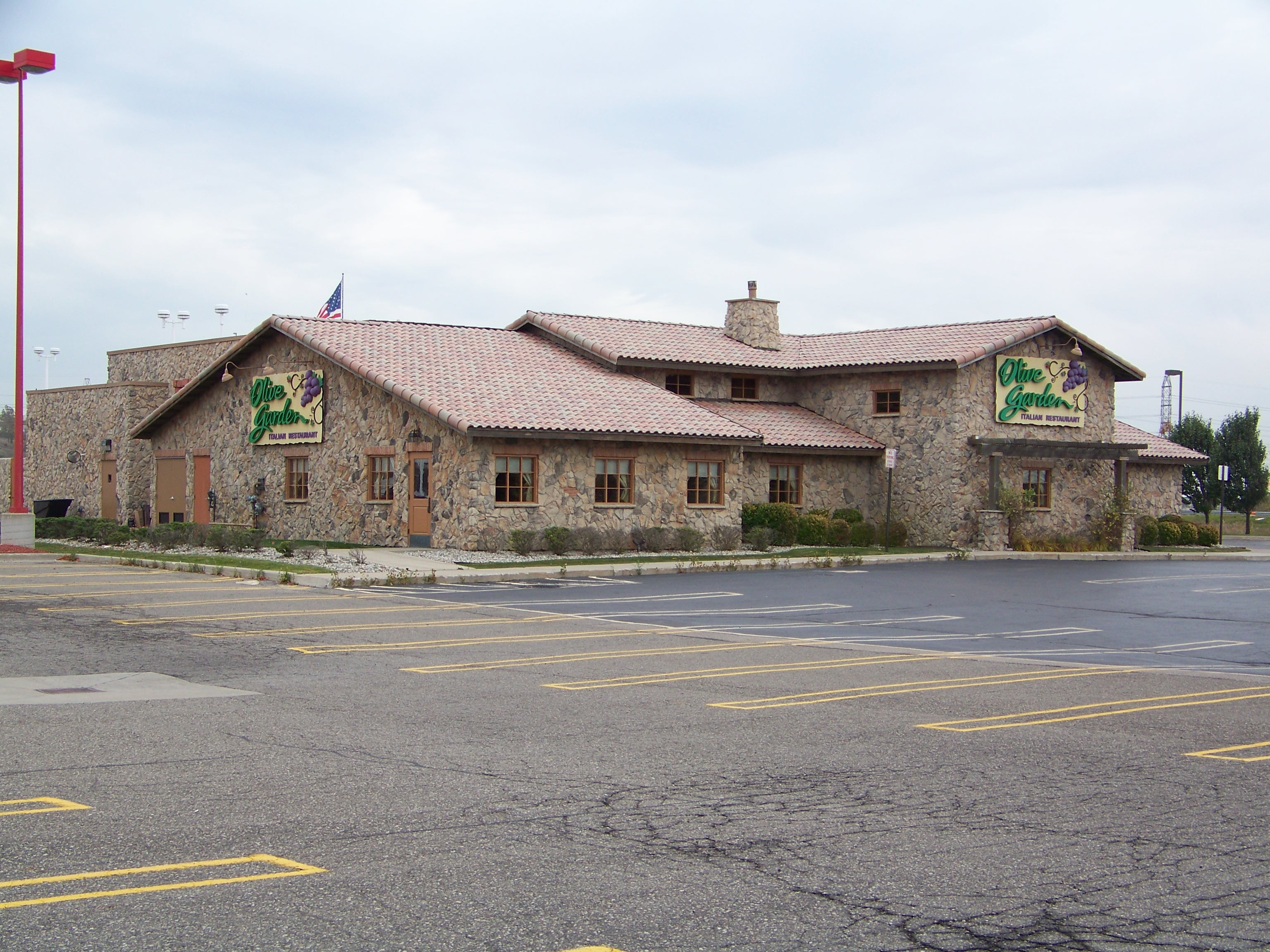 Olive Garden